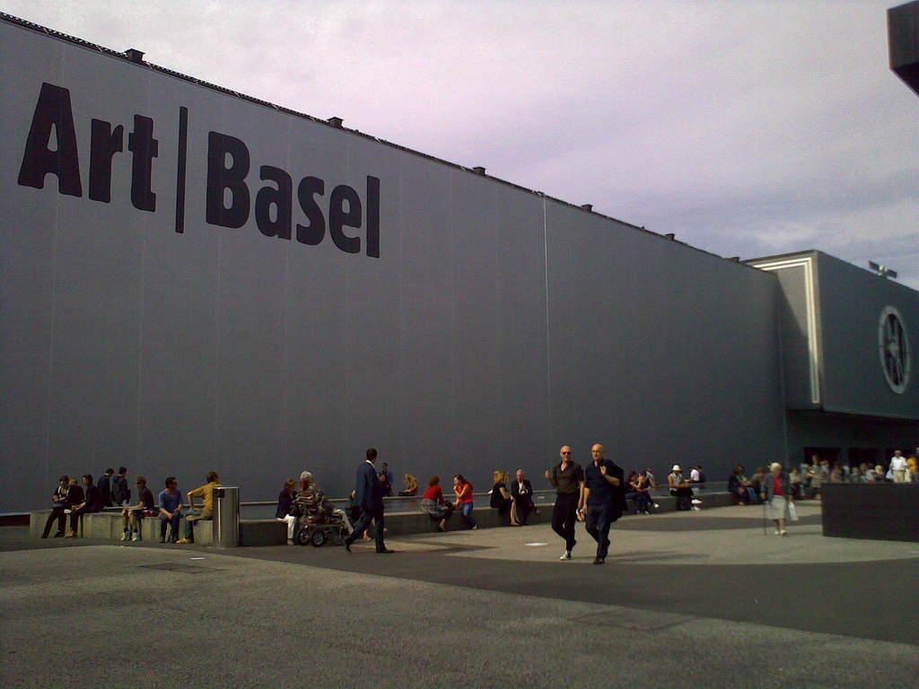 Art Basel 2009 in Basel. J Art Basel 2009 in Basel. June. Art Basel 2009 in Basel. June.